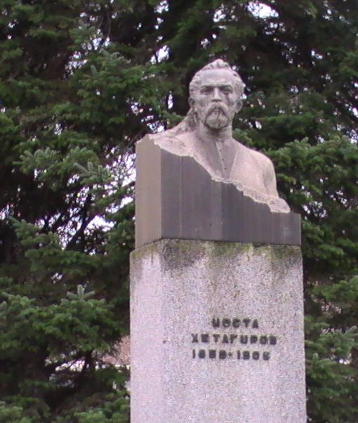 Памятник осетинскому поэту и живописцу Константину Левановичу (Коста) Хетагурову перед Домом культуры в городе Кырджали (Болгария). Установлен в период активных побратимских отношений между городами Кырджали и Орджоникидзе (ныне Владикавказ).